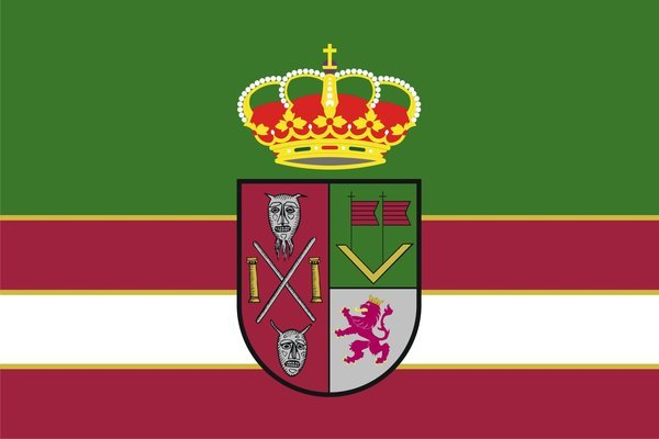 Escudo de Villamandos